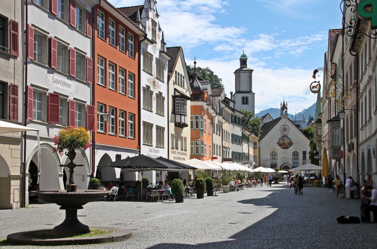 Feldkirch (Vorarlberg): Blick über den Marktplatz.